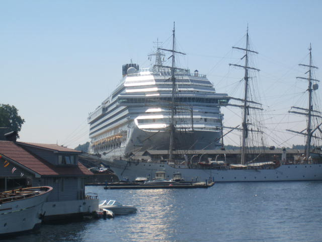 Kreuzfahrtschiff im Hafen von Oslo